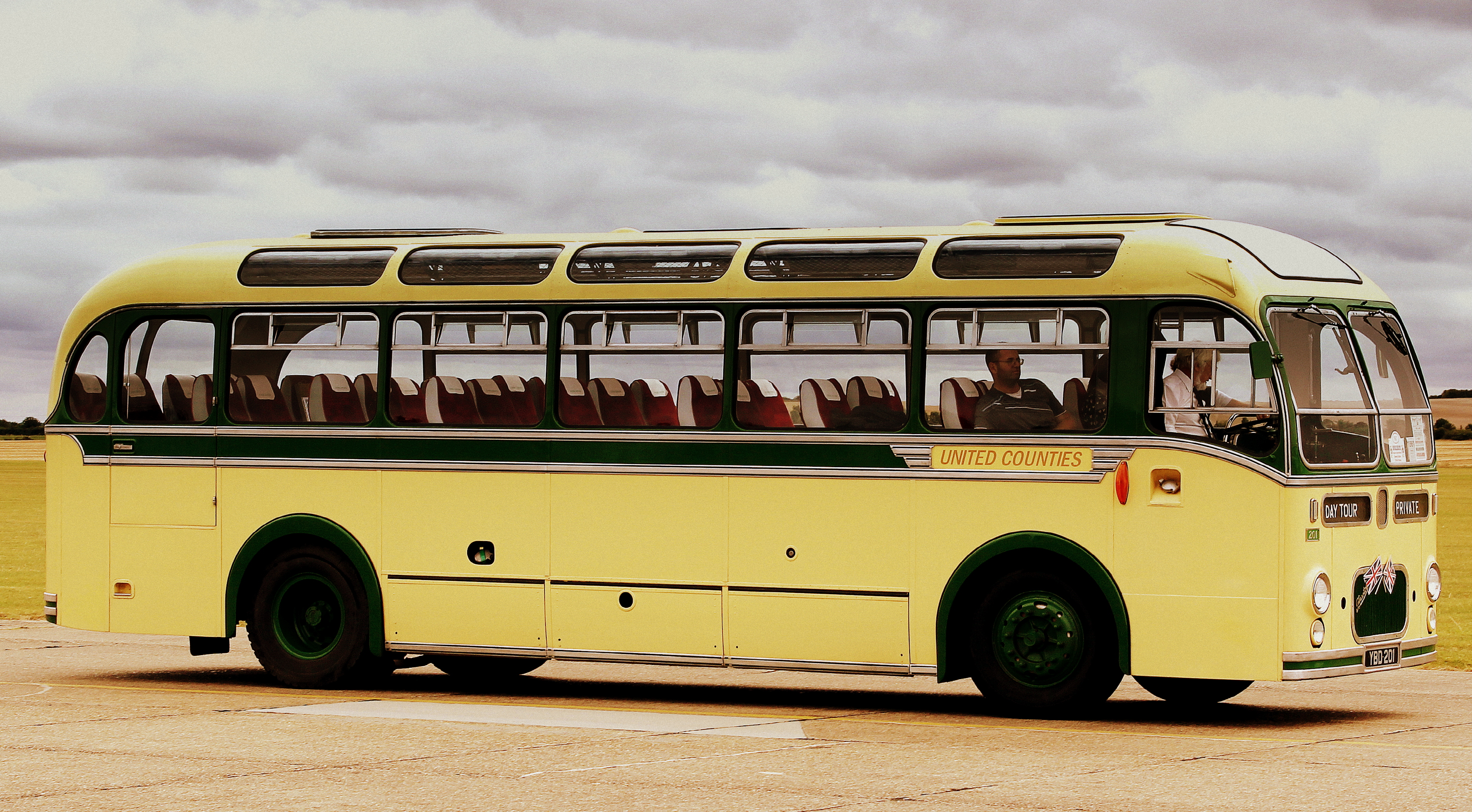 BRISTOL BRISTOL MW6G WITH E.C.W. C39F BODYWORK OF UNITED COUNTIES AT SHOWBUS DUXFORD SEP 2012